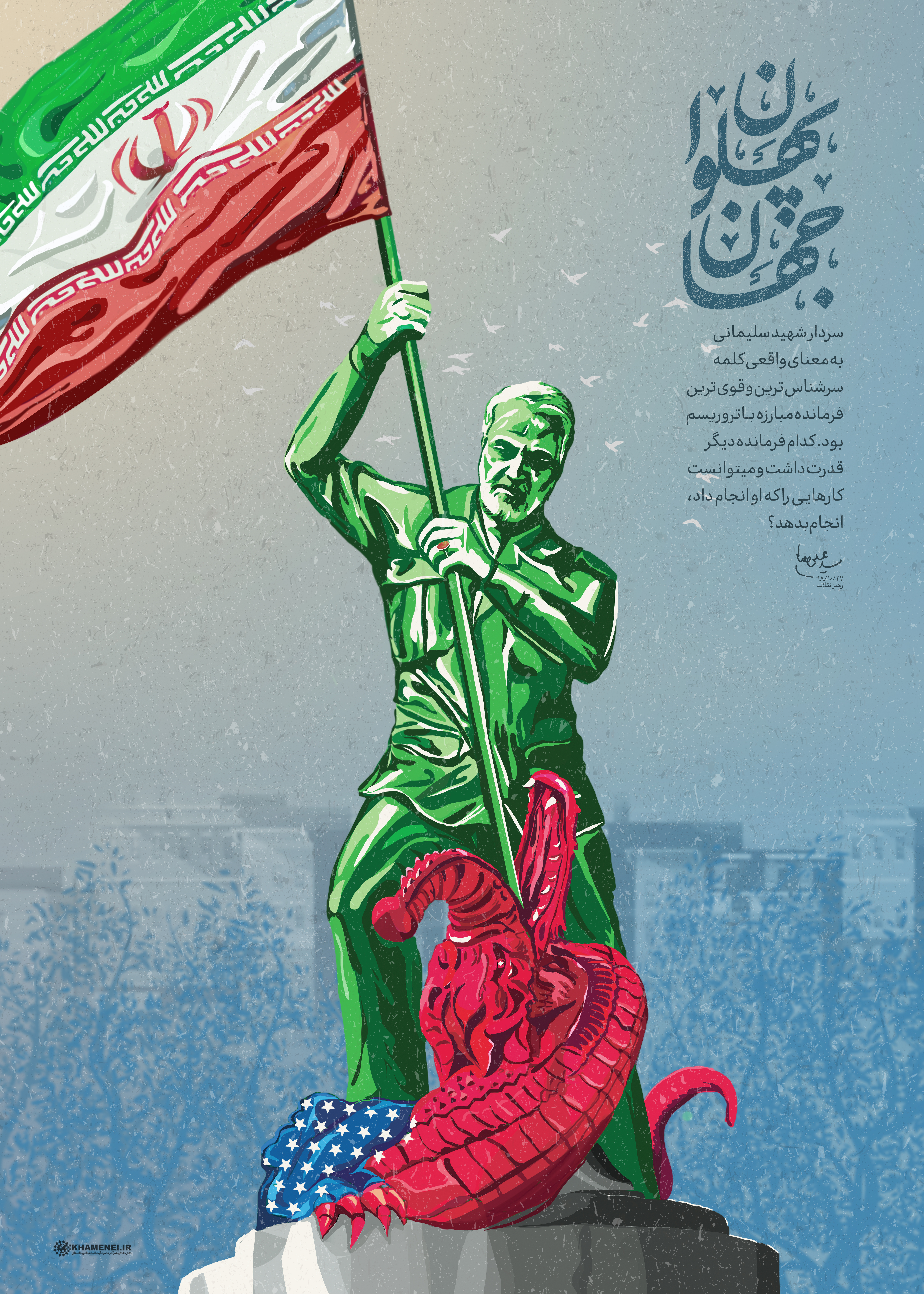 قاسم سلیمانی در حال کشتن یک تمساح (ایالات متحده آمریکا) با پرچم ایران